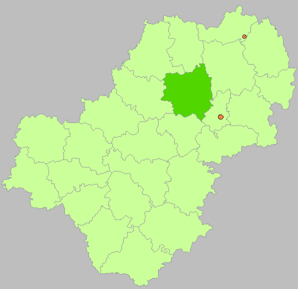 Kaluga Oblast map by Al Silonov Карта районов Калужской области